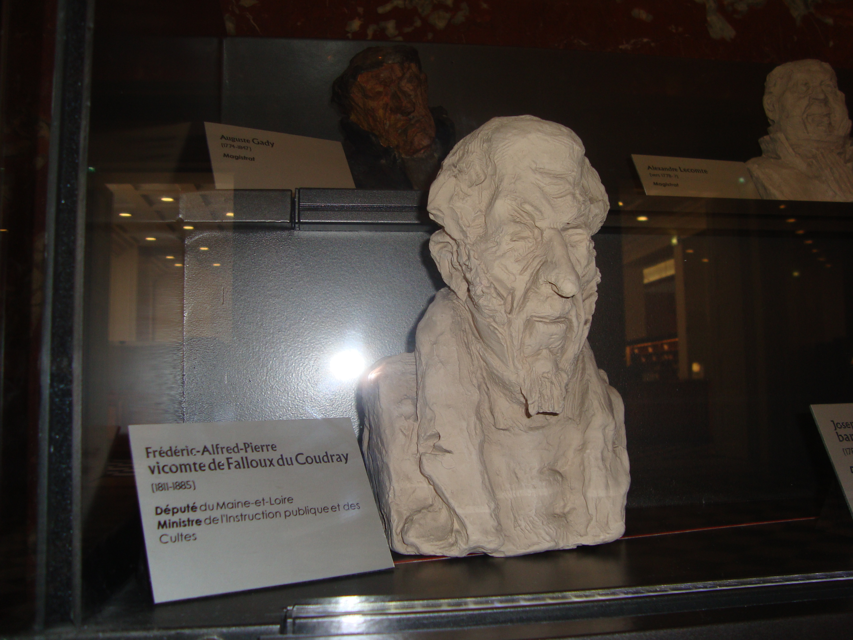 Caricature du Comte de Falloux par Honoré Daumier. Photo de la copie du Palais Bourbon. Original au Musée d'Orsay.